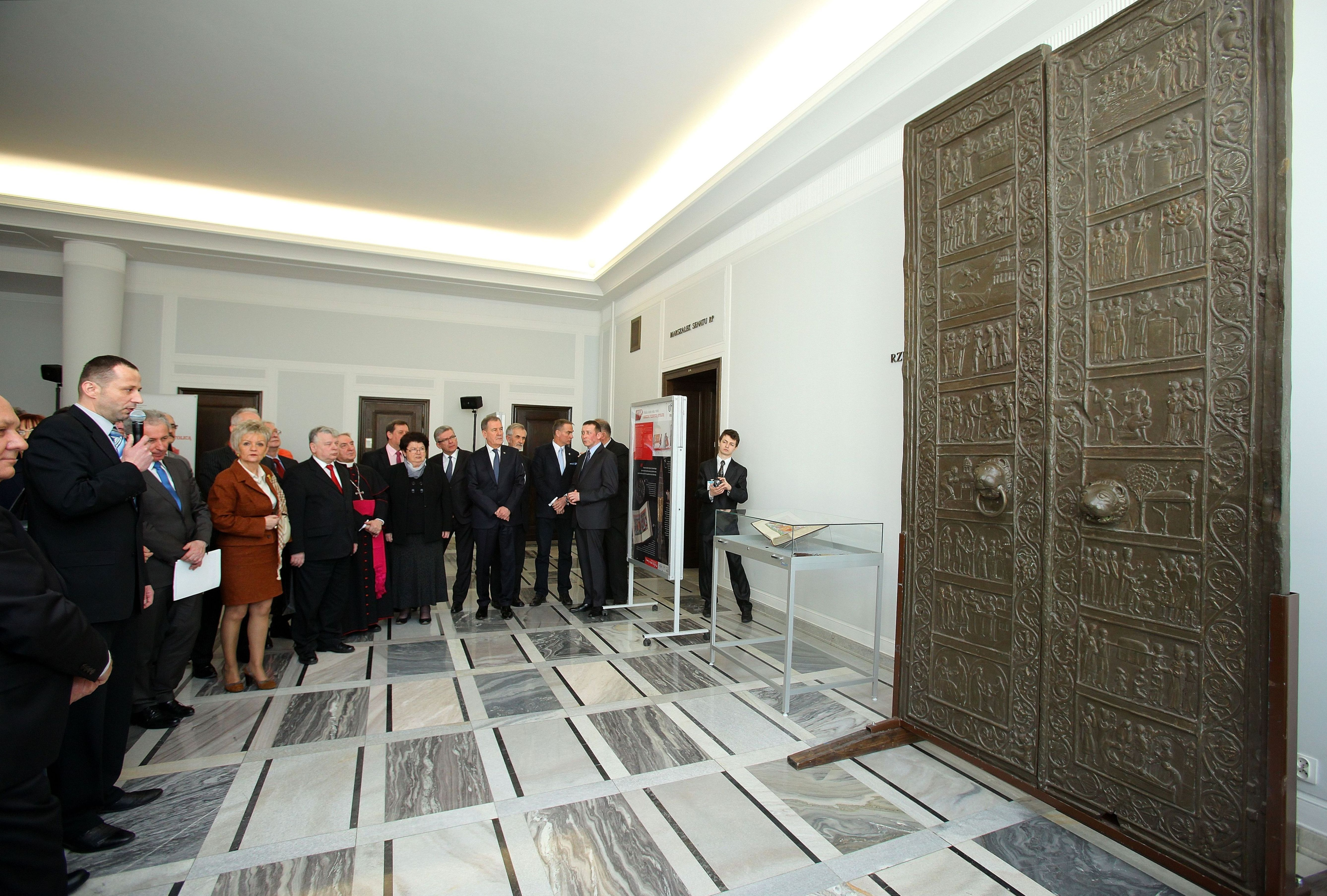 Kopia Drzwi Gnieźnieńskich. Wystawa "Polska około roku 1000. Gniezno pierwszą stolicą Polski" w Senacie RP